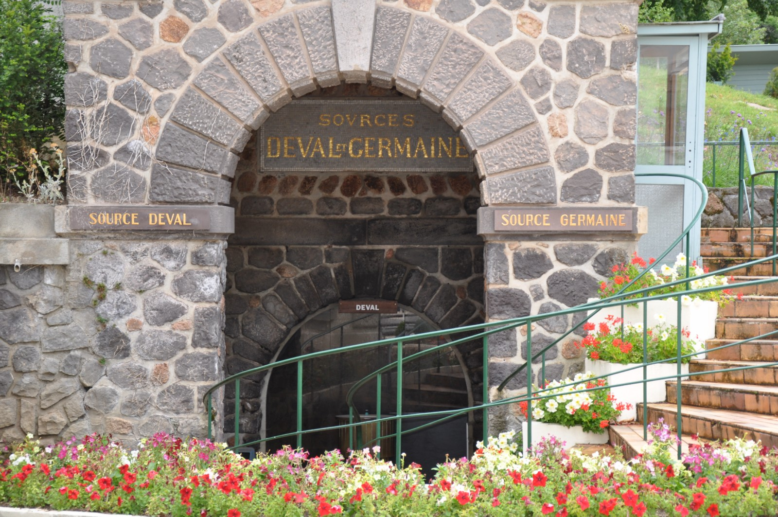 Sources Chatel-Guyon